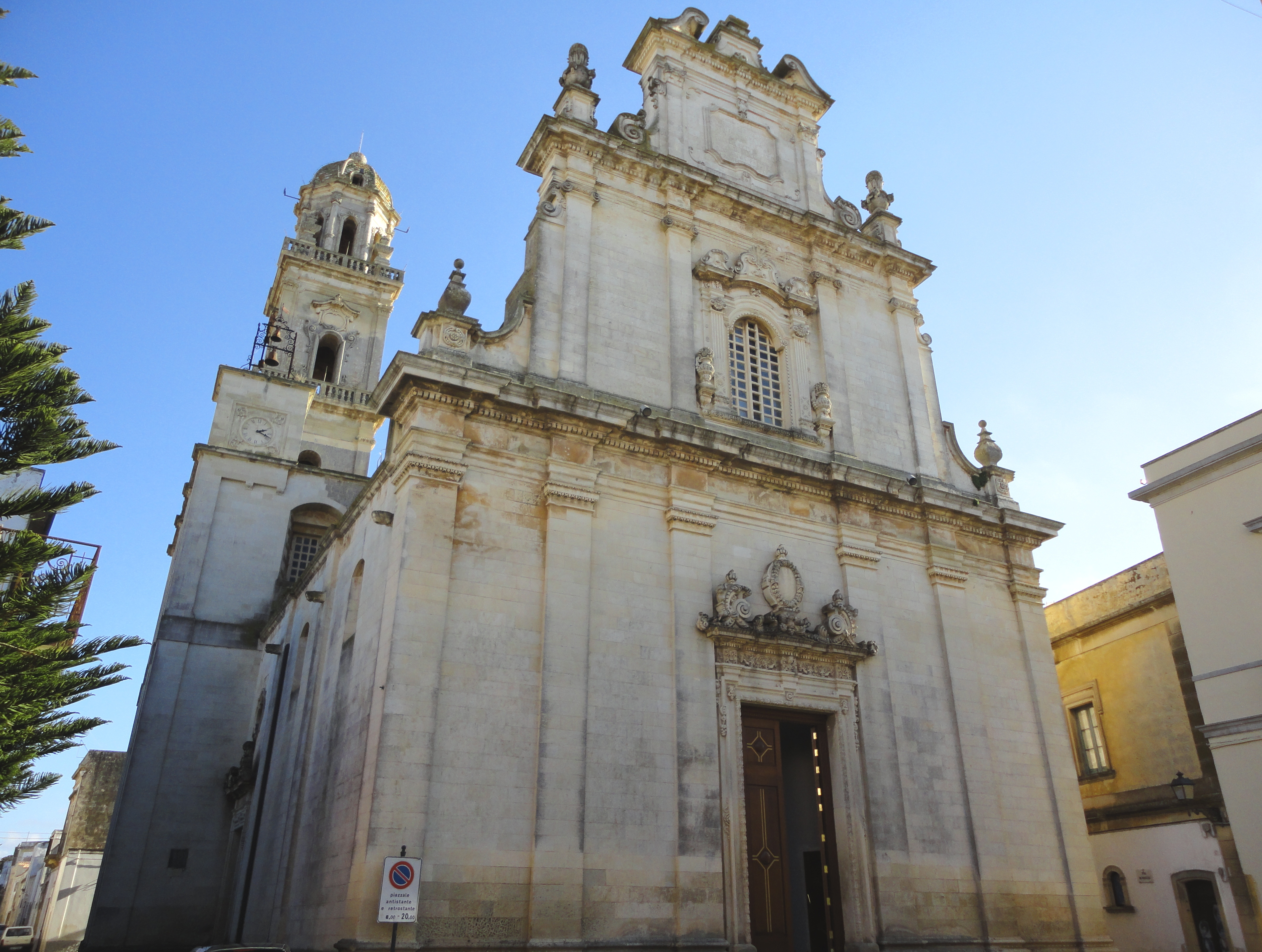 Chiesa Madonna Assunta Sternatia, Lecce